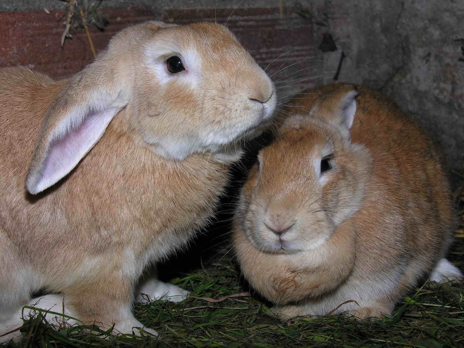 Teaño - Cuntis - Galicia - Spain